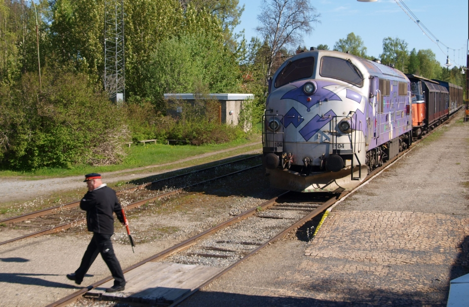 Zugkreuzung auf der Inlandsbahn in Ulriksfors